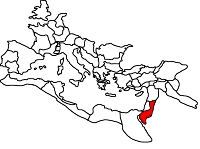 Mappa di localizzazione della provincia romana dell'Arabia Petrea Categoria:Immagini esclusivamente in GNU FDL